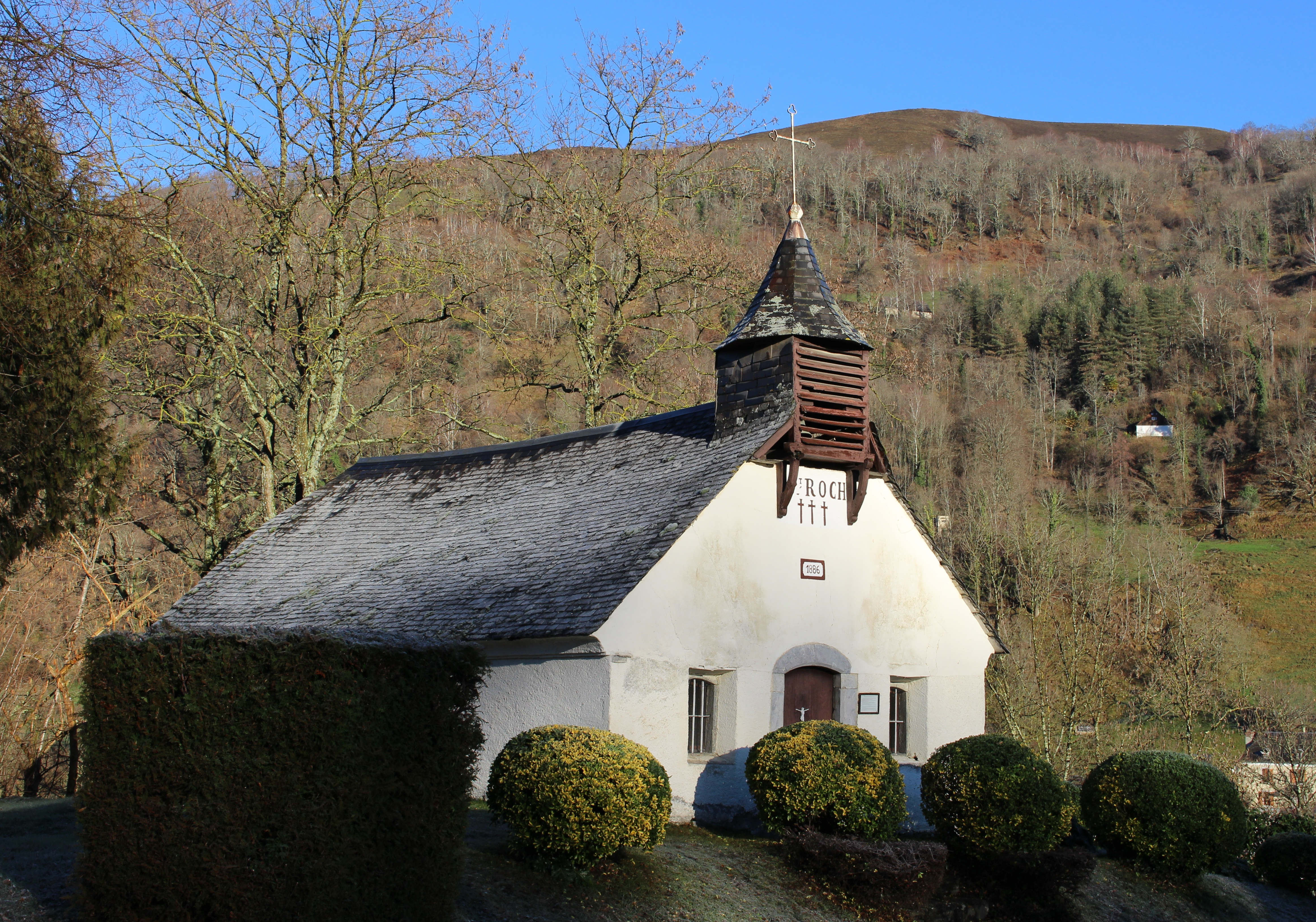 Chapelle Saint-Roch de Juncalas (Hautes-Pyrénées)